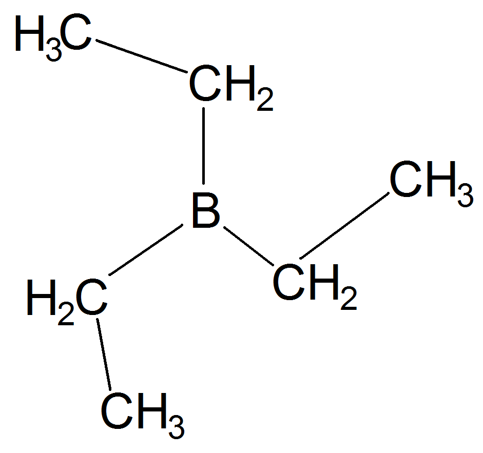 Trietyyliboraani on organoboraani.